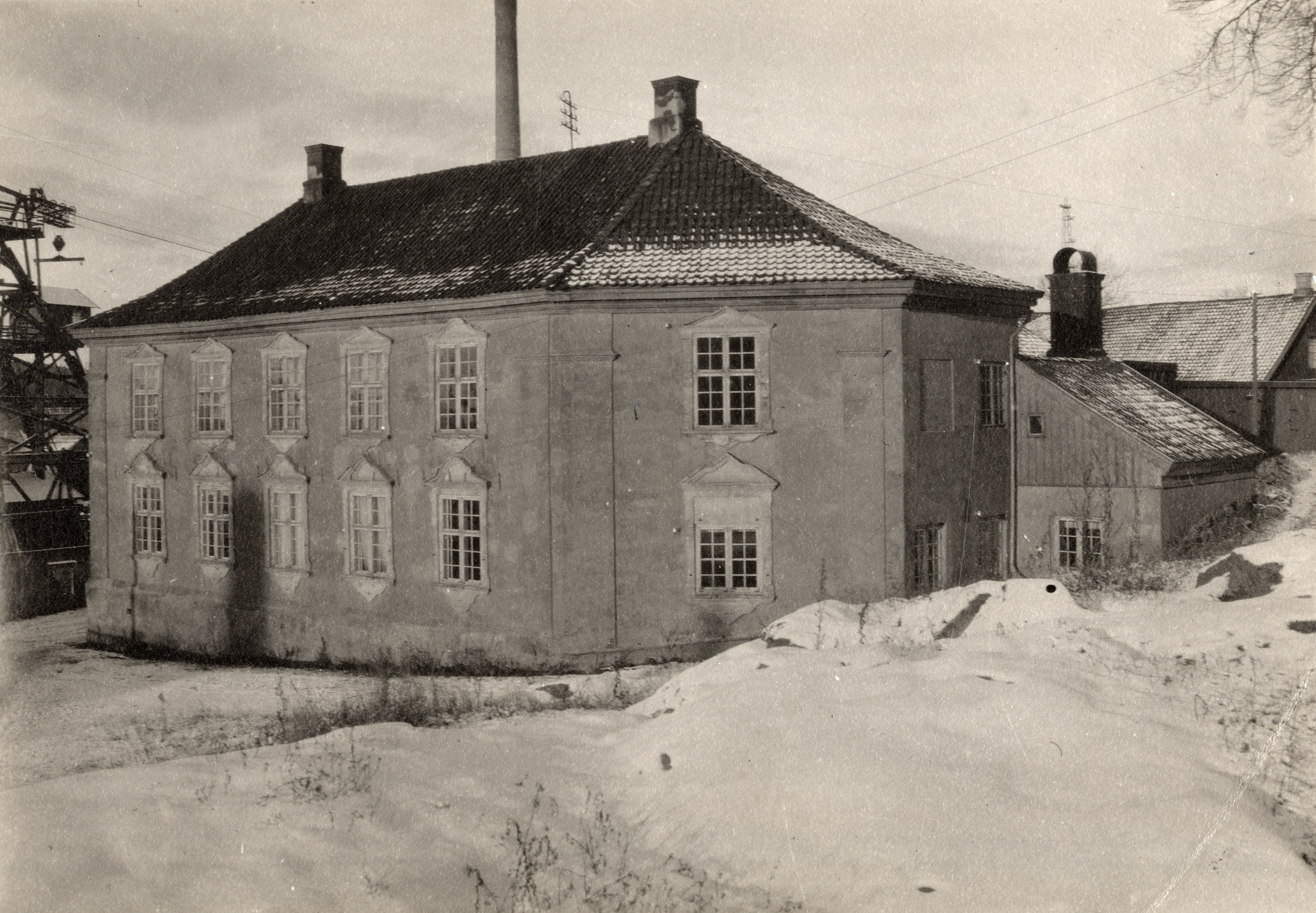 Konventionsgården i Moss, Østfold